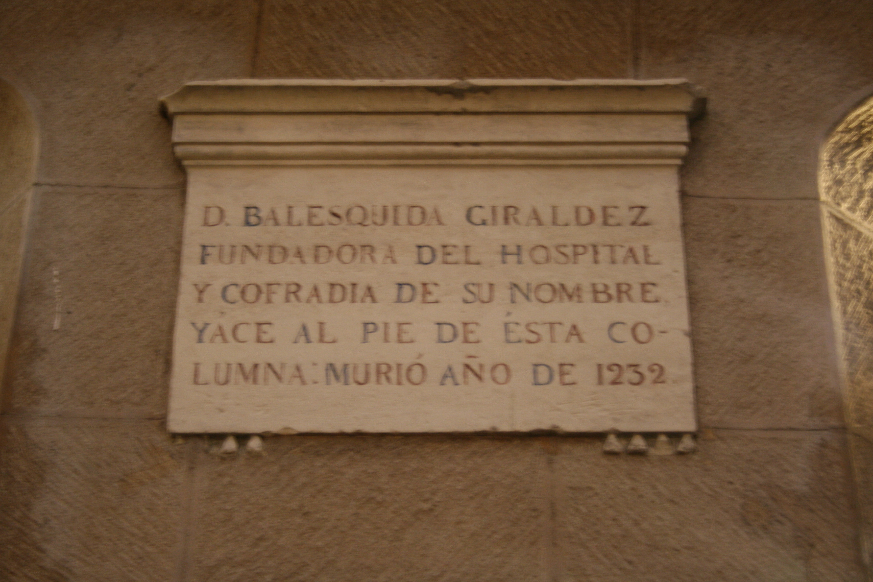 Placa sepulcral Valesquita iglesia de San Tirso